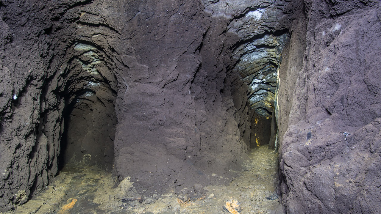 Förderstrecke